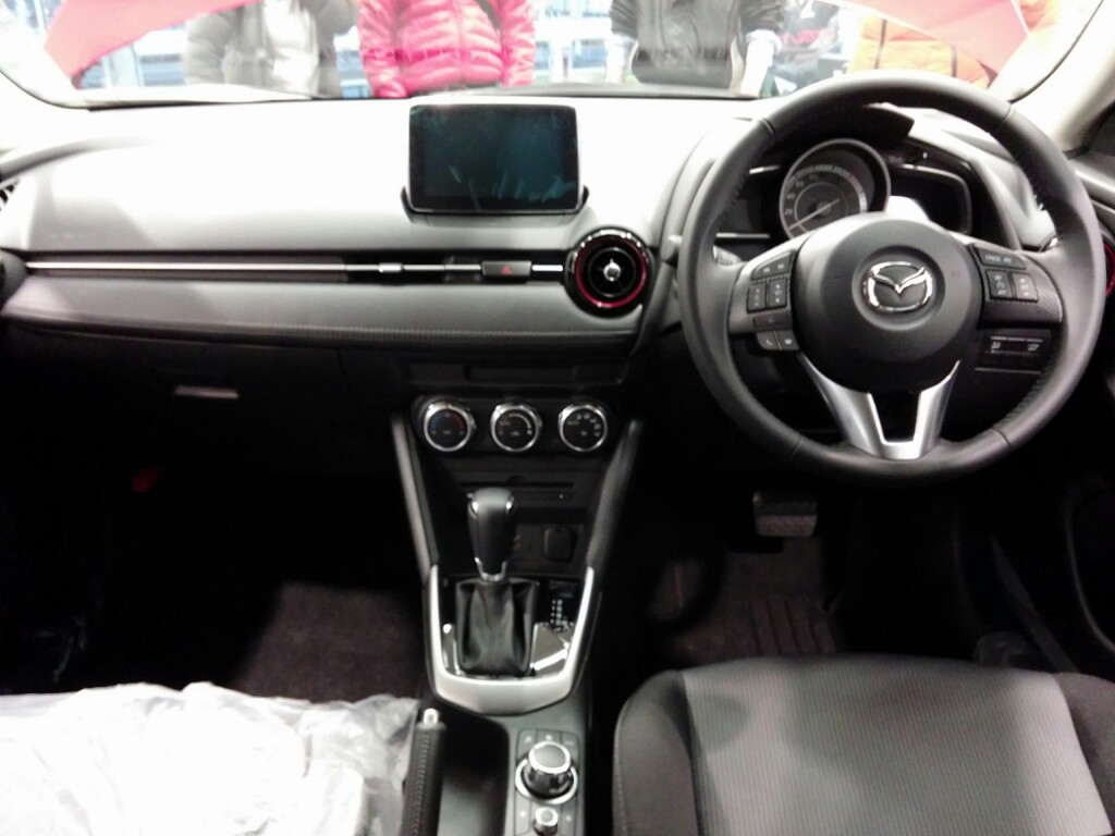 マツダ・CX-3